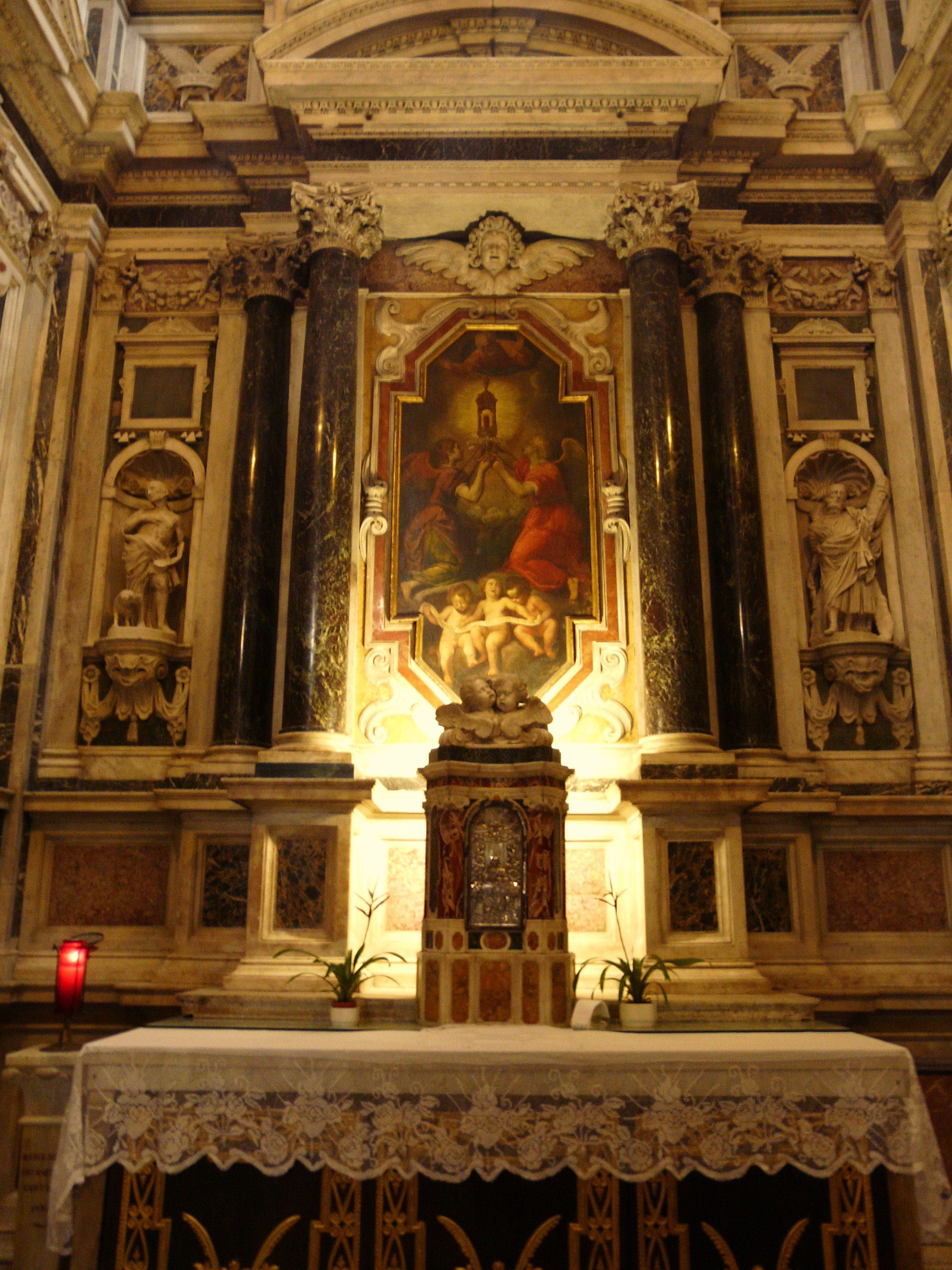 Altare maggiore della Cattedrale di Santa Maria Assunta, Sarzana, Liguria, Italia